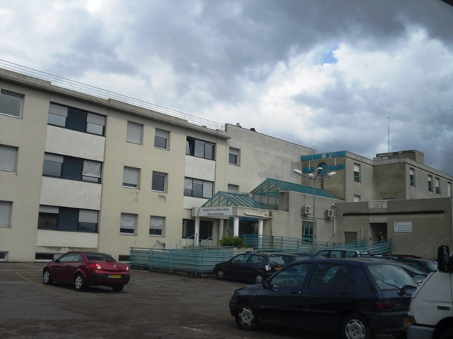 L'hôpital privé d'Athis-Mons (91)